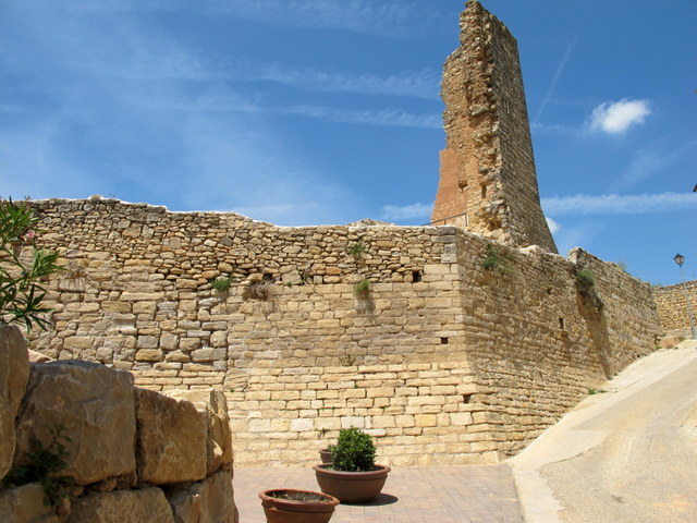 Castell Solivella a la Conca de Barberà - Catalunya